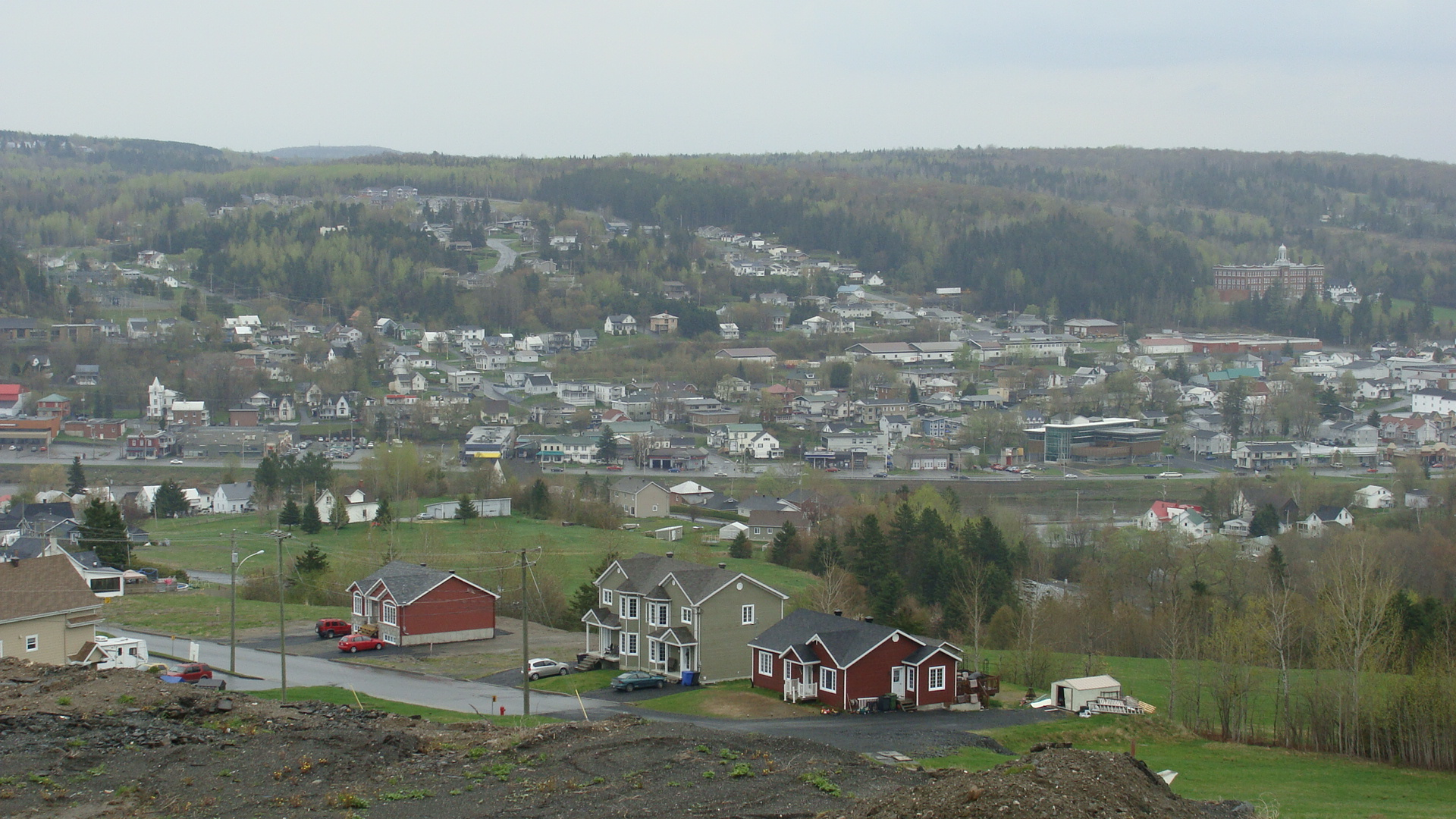 Beauceville, au Québec (Canada), vue de l'hôpital de Beauceville.